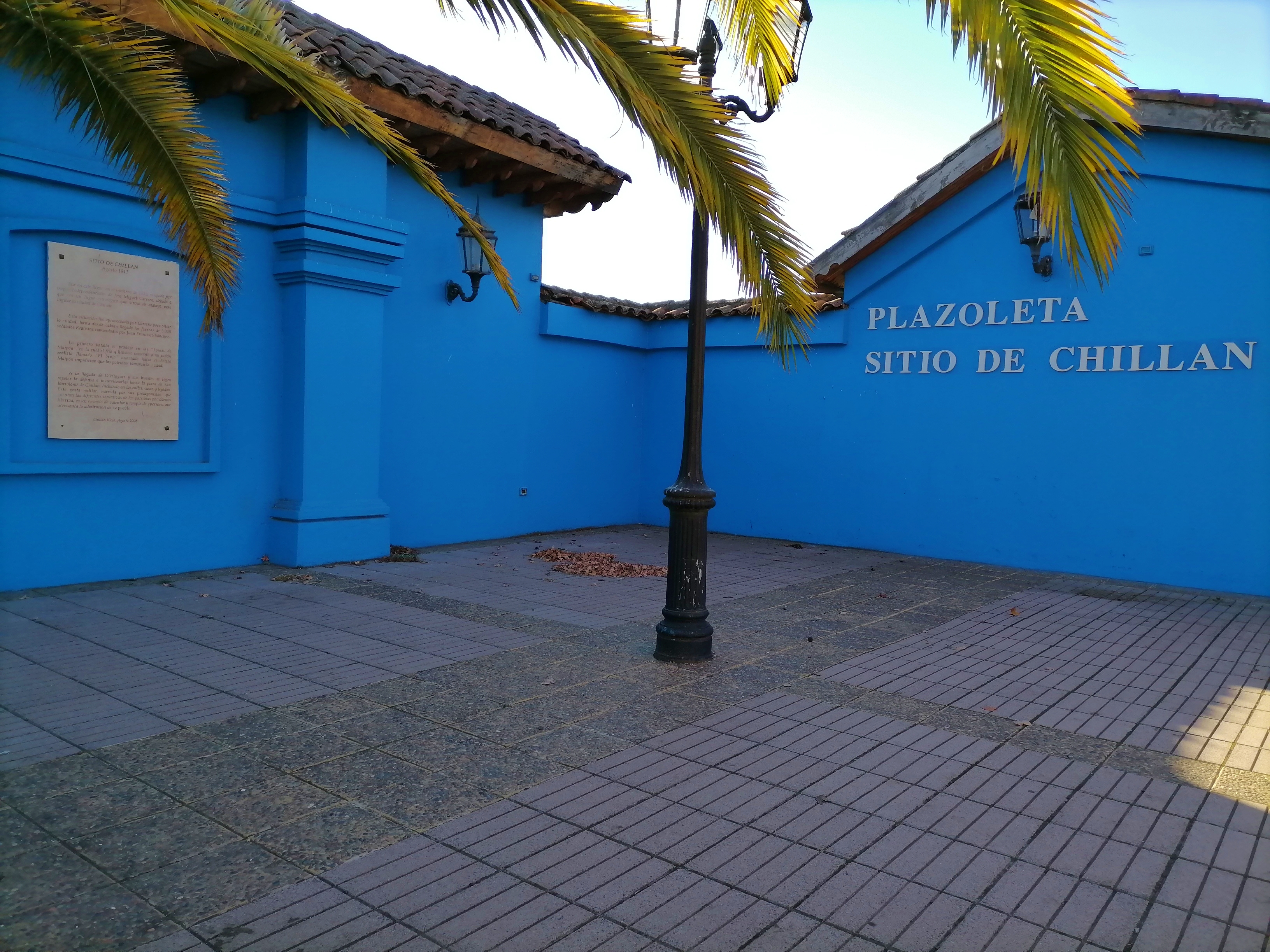 Plazoleta que recuerda el Sitio de Chillán, ubicada en el lugar del Combate de maipón, sucedido el 3 de agosto de 1813.